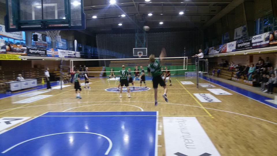 Mecz SPS Prudnik z LKS Miraż Głubczyce rozegrany 23 października 2016, który zakończył się wygraną Prudnika 3:0.